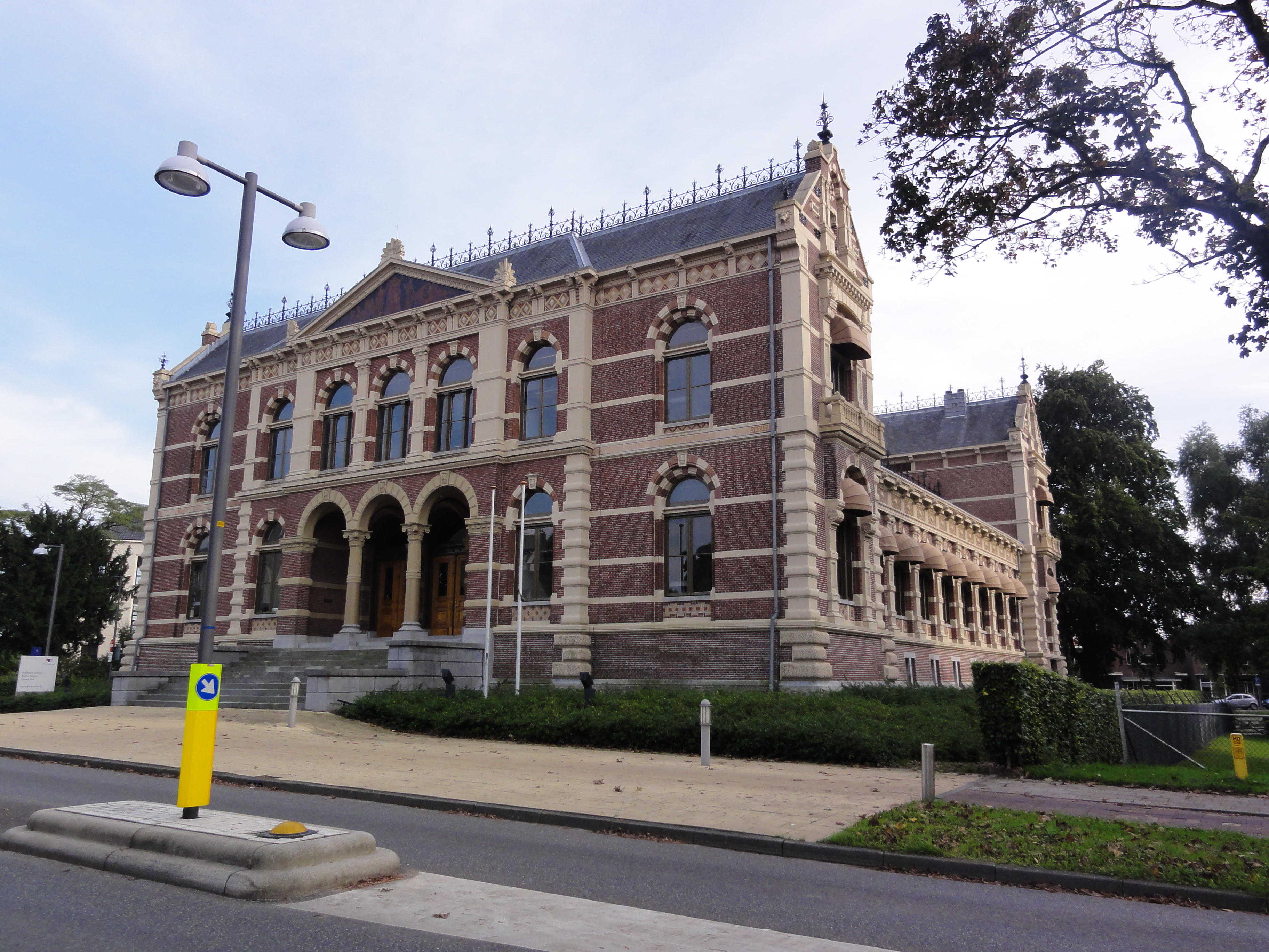 Tiel Rijksmonument 520663 Kantongerecht Nieuwe Tielseweg 1 46″ N, 5° 26′ 09.33″ E